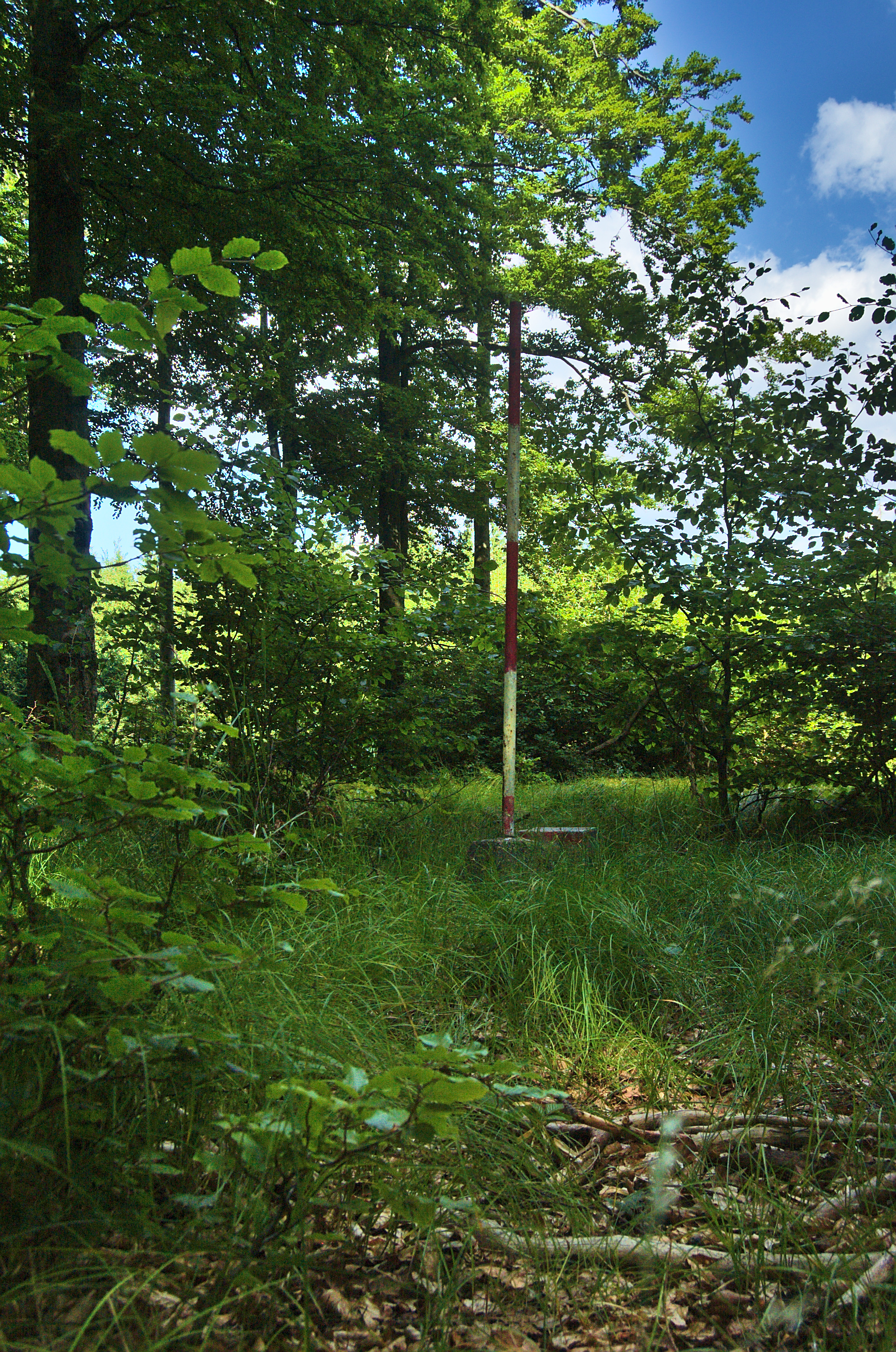 Skalky - vrchol, Buková, okres Prostějov